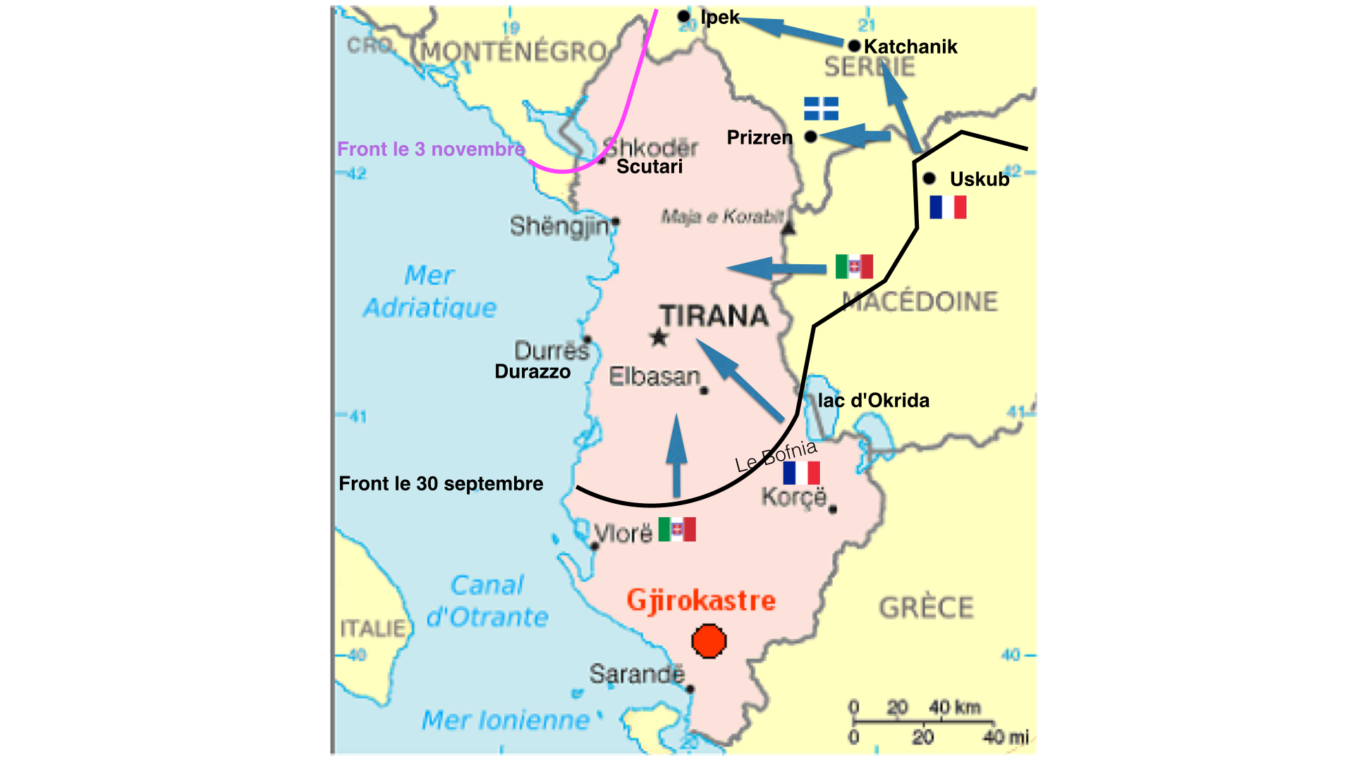 Libération de l'Albanie (1918) sur Gji01.png Une page de Wikimedia Commons